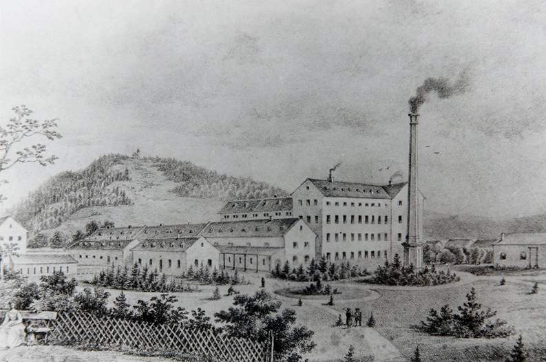 Továrna firmy Thonet v Bystřici pod Hostýnem kolem roku 1873.